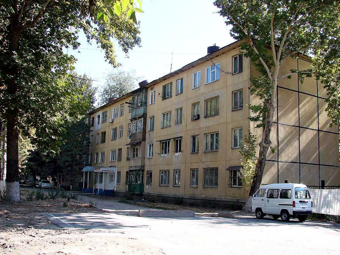 Ташкент. Фотография первого панельного четырехэтажного дома в Ташкенте. Дом расположен на Текстиле напротив начала улицы Мукими.